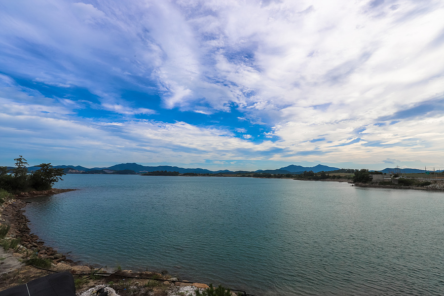 임하도의 좁은목이며 울돌목으로 들어가는목이다. 서해에서 이 목을 통과하게 되면 명량해협으로 진입하게 된다.